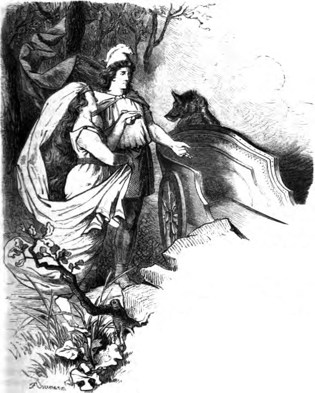 Captioned as "Skirnir beschwört Gerda ihm zu folgen". Skírnir persuades Gerðr to follow him.